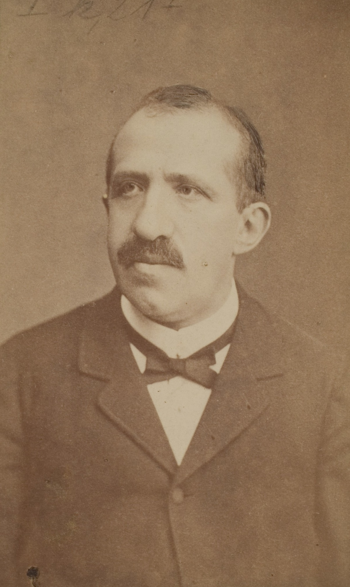 Leo Koenigsberger, Mathematiker, 1869–1875 und 1884–1914 Professor in Heidelberg